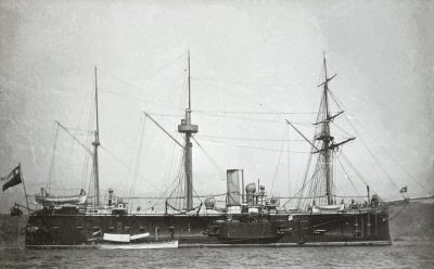 Fragata blindada chilena Blanco Encalada